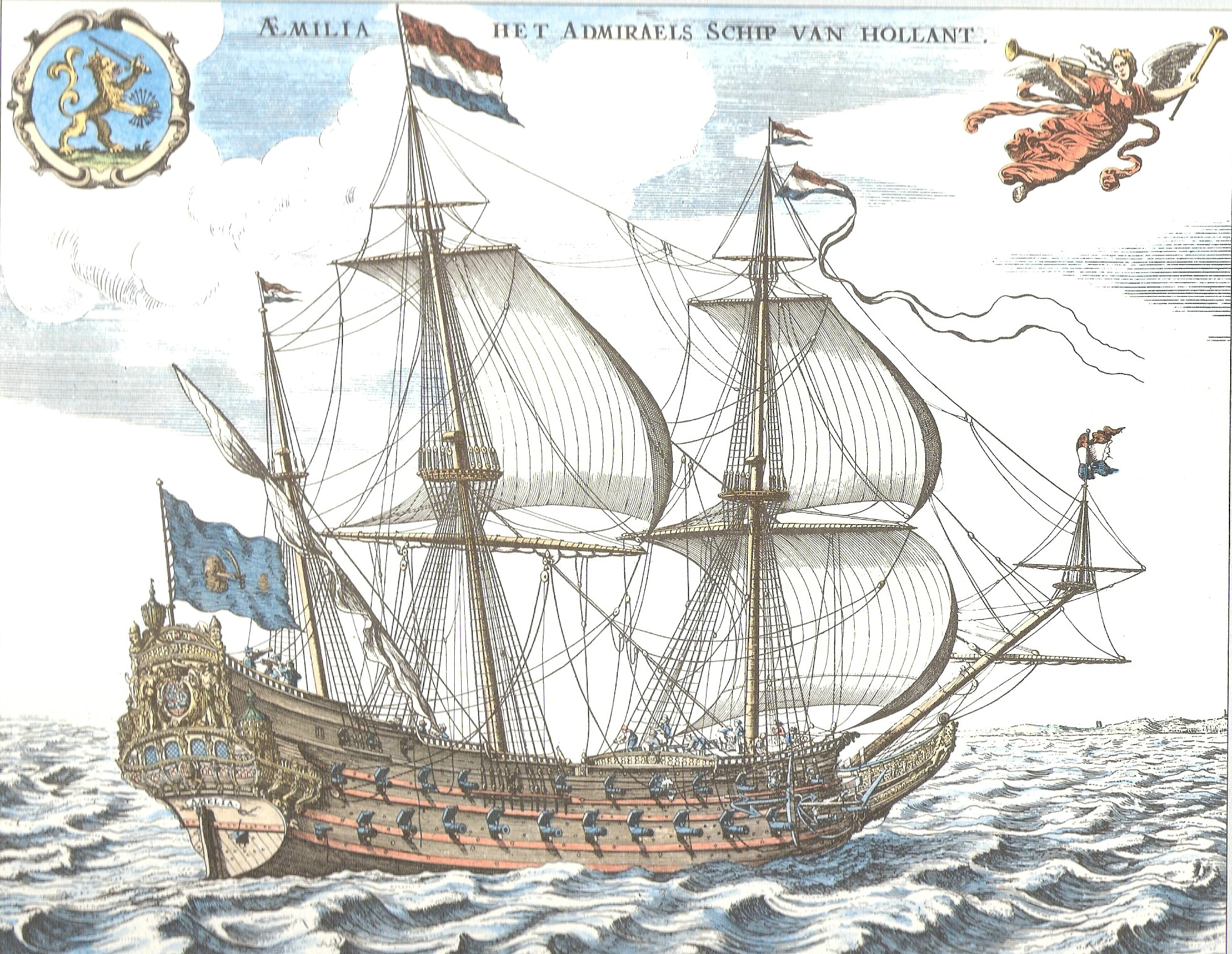 Niederländisches Kriegsschiff Aemilia, Kupferstich von Wilhelm van den Velde (de Oude), Marine Museum Niederlande